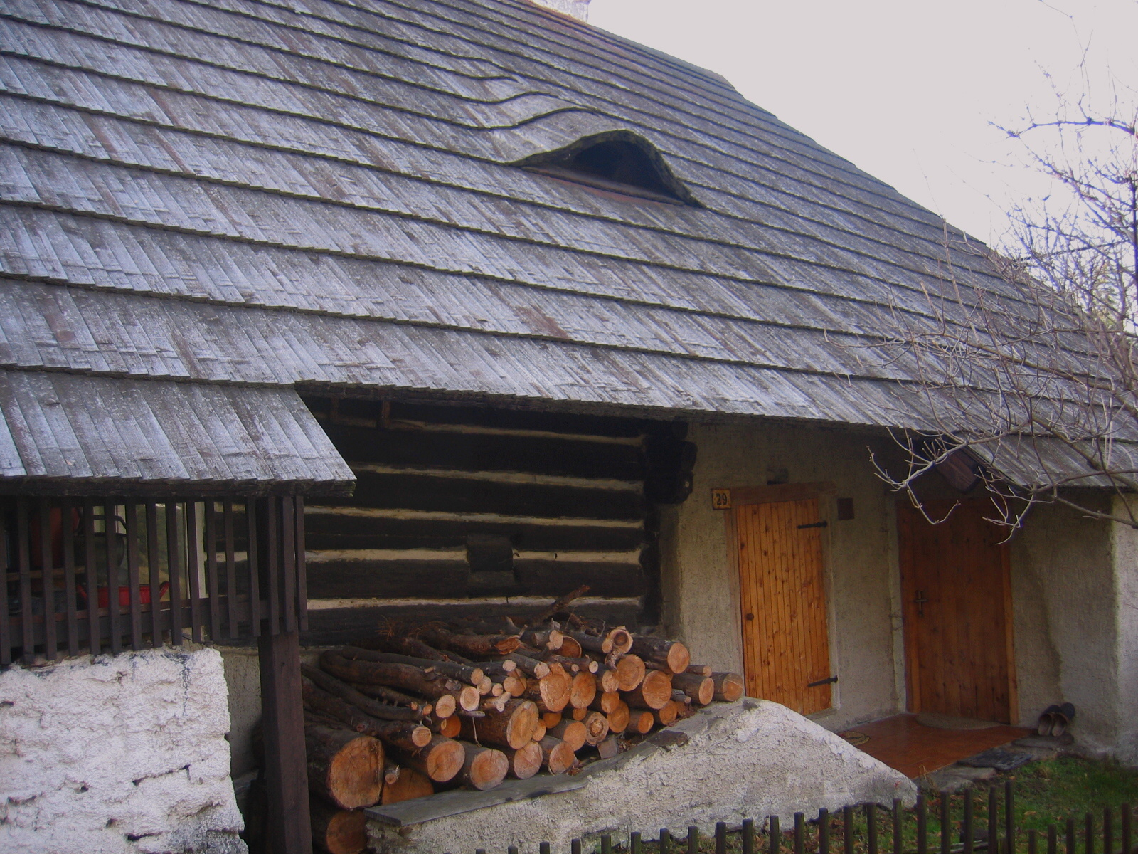 Strašín čp. 29 (okr. Klatovy), detail zápraží. Částečně roubené stavení uprostřed návsi. Foceno od severu.